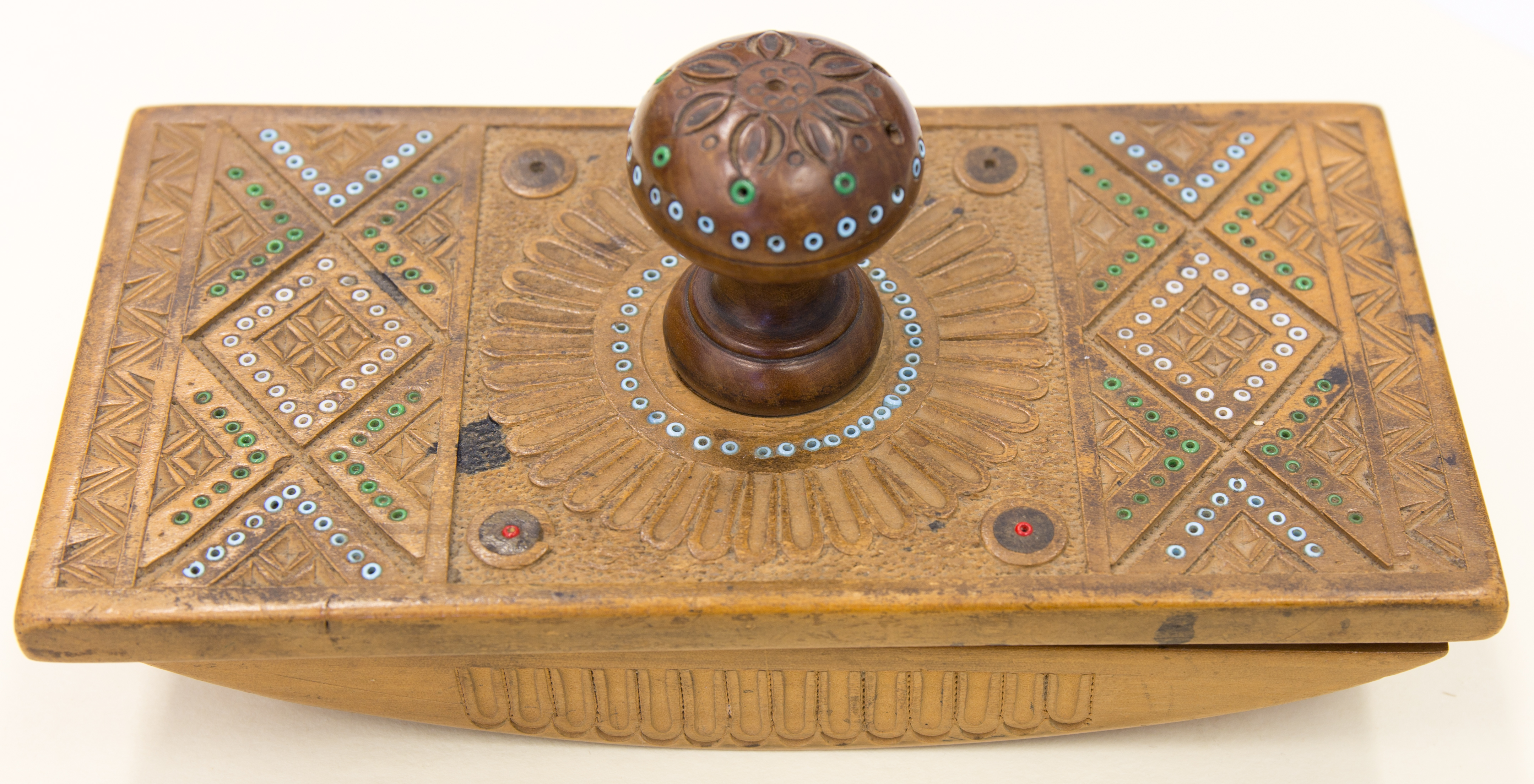 Löschwiege Indetifikations-Nr.: N (9 A 76) 217/1992 Geographischer Bezug: Berlin Höhe x Breite x Tiefe: 7 x 16 x 8 cm Ausgabe: Holz, geschnitzt, eingelegte kleine Kunststoffringe Zustand: gebraucht Beschreibung: Braune Löschwiege aus Holz, mit mustergeschnitzter Oberfläche und Knauf sowie eingelegten kleinen Kunststoffringen (weiß, rot, grün, hellblau), von denen einige fehlen.